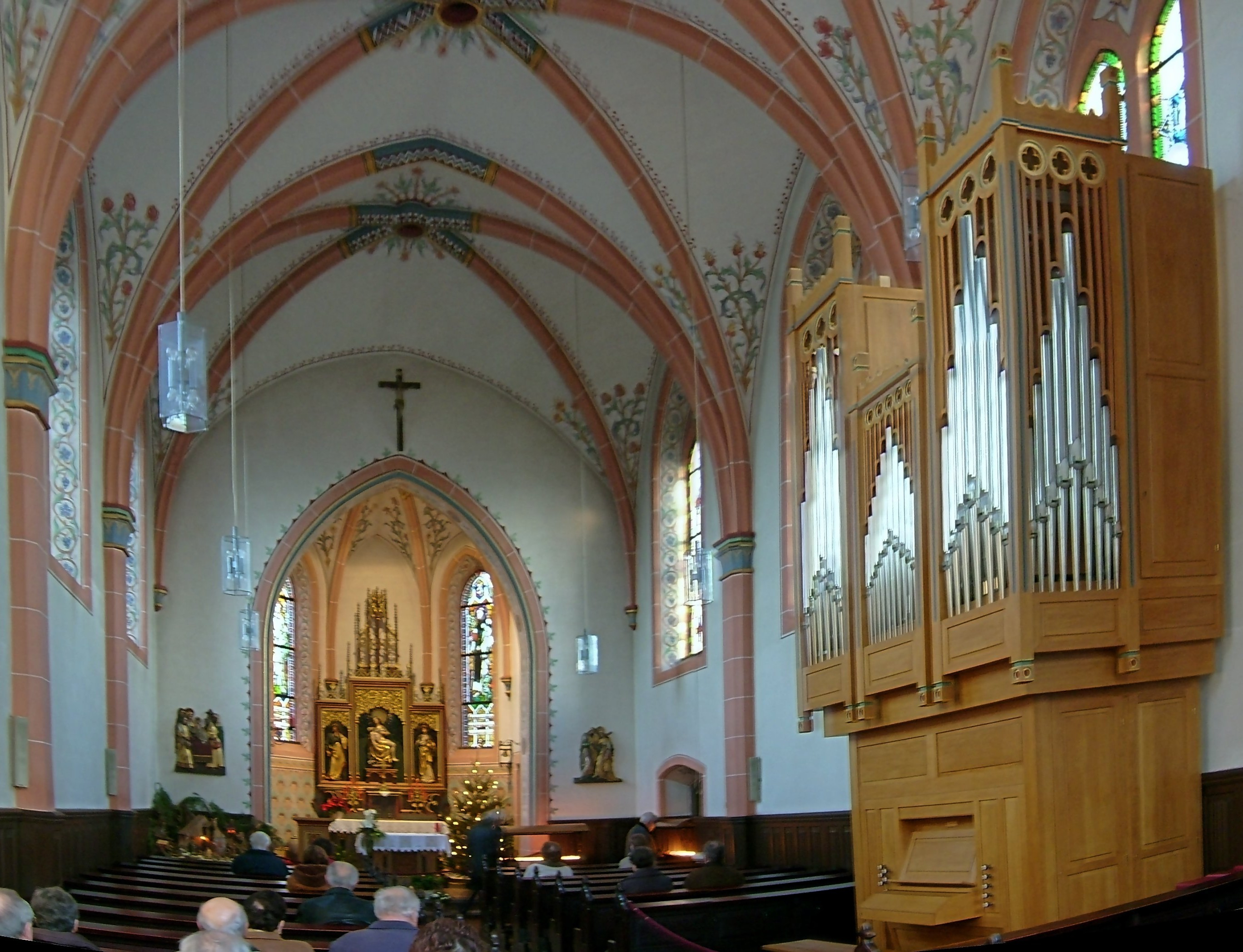 Innenansicht Bergkapelle bei Illingen (Saar)